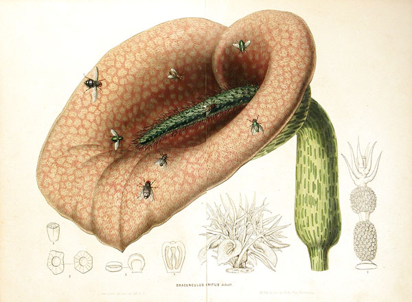 Helicodiceros_muscivorus Engl.